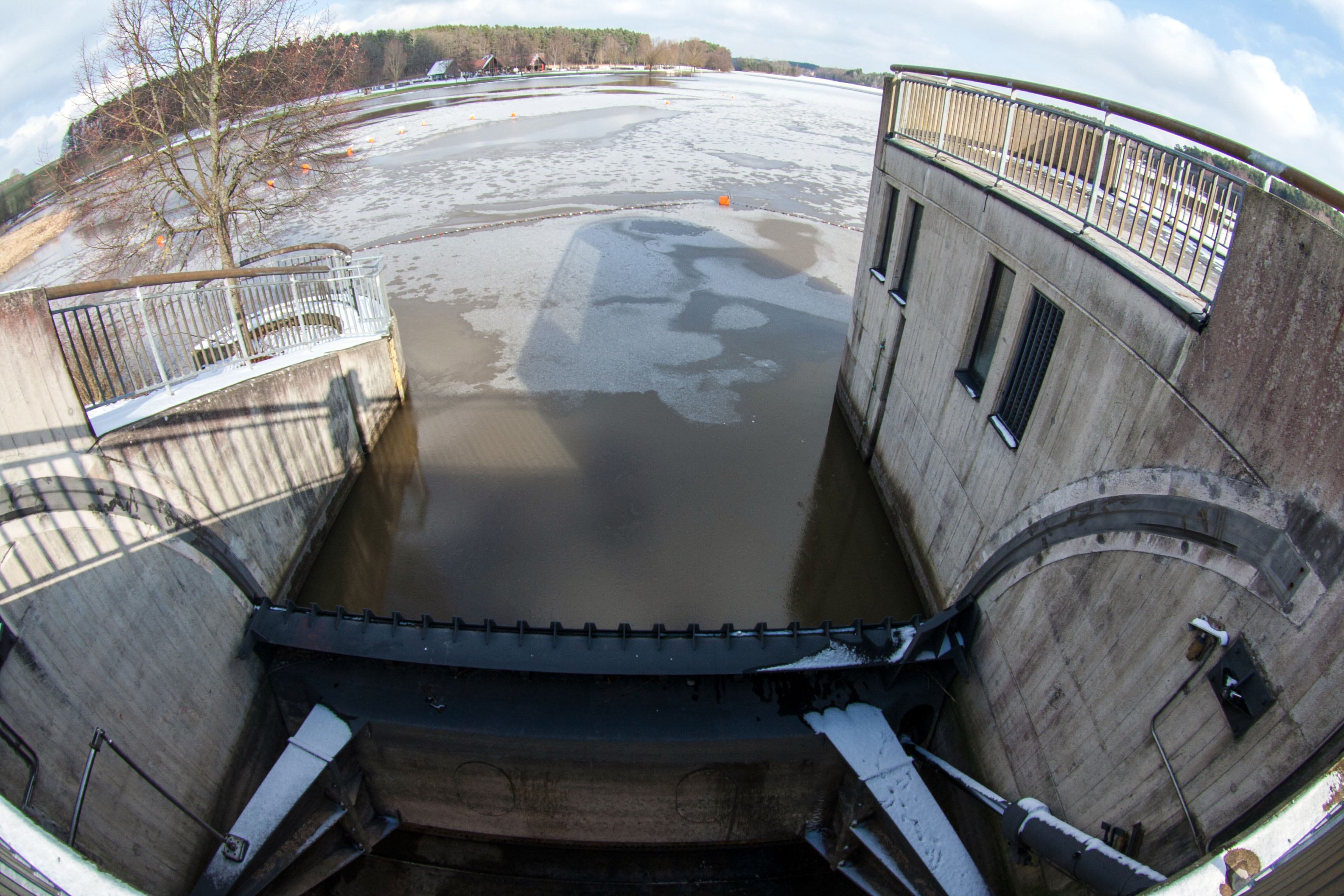 Rothsee, Vorsperre, Winter 2013